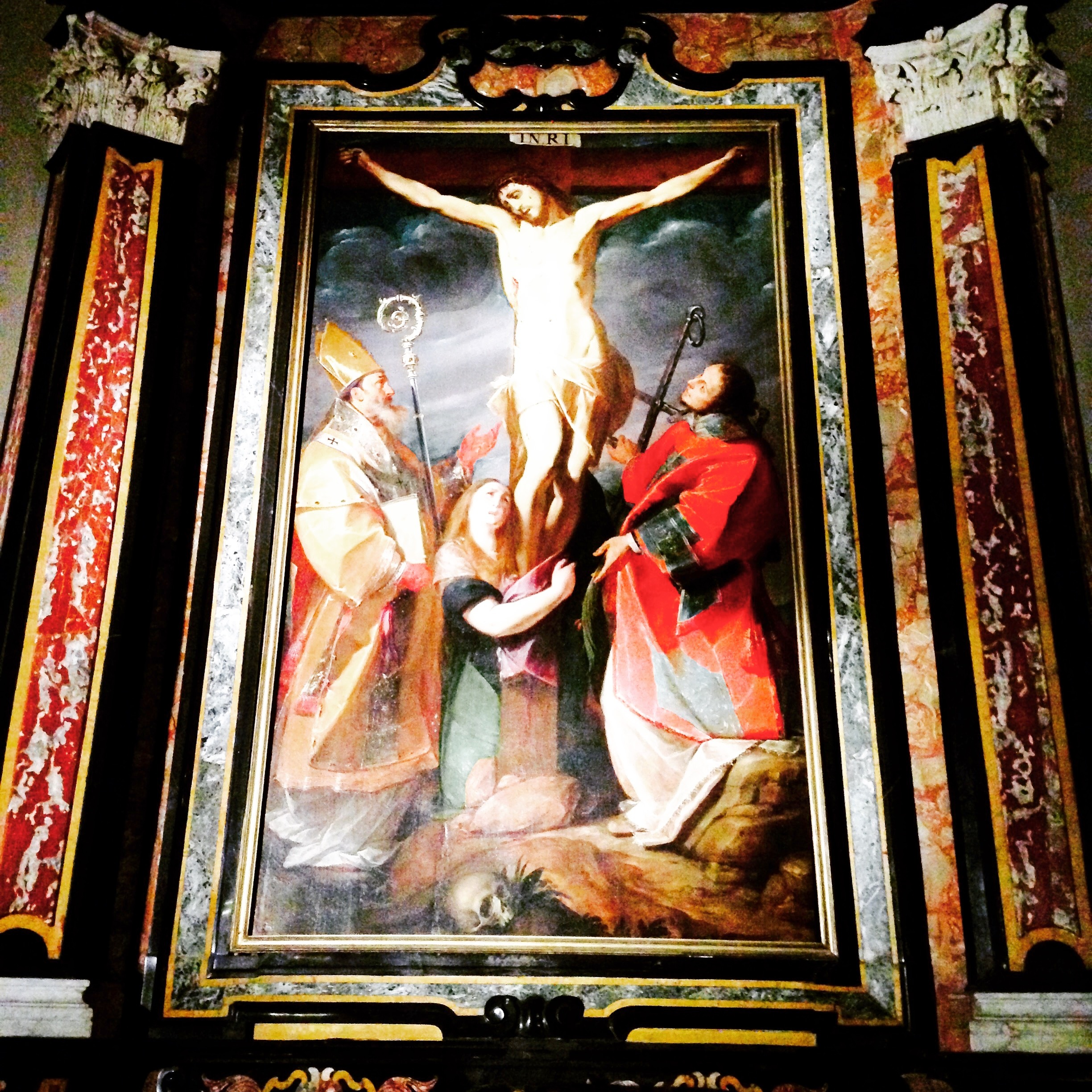 Mortara, Basilica di San Lorenzo Martire, interno: "Crocifissione, con i Santi Ambrogio, Lorenzo e Maria Maddalena", pala d'altare opera di Giovanni Battista Crespi, detto Il Cerano.